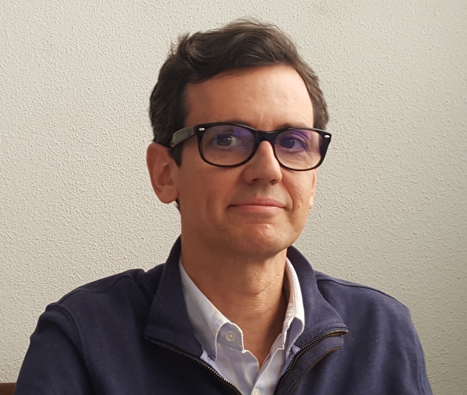 José A. Ruiz San Román en la Universidad Complutense de Madird marzo 2017